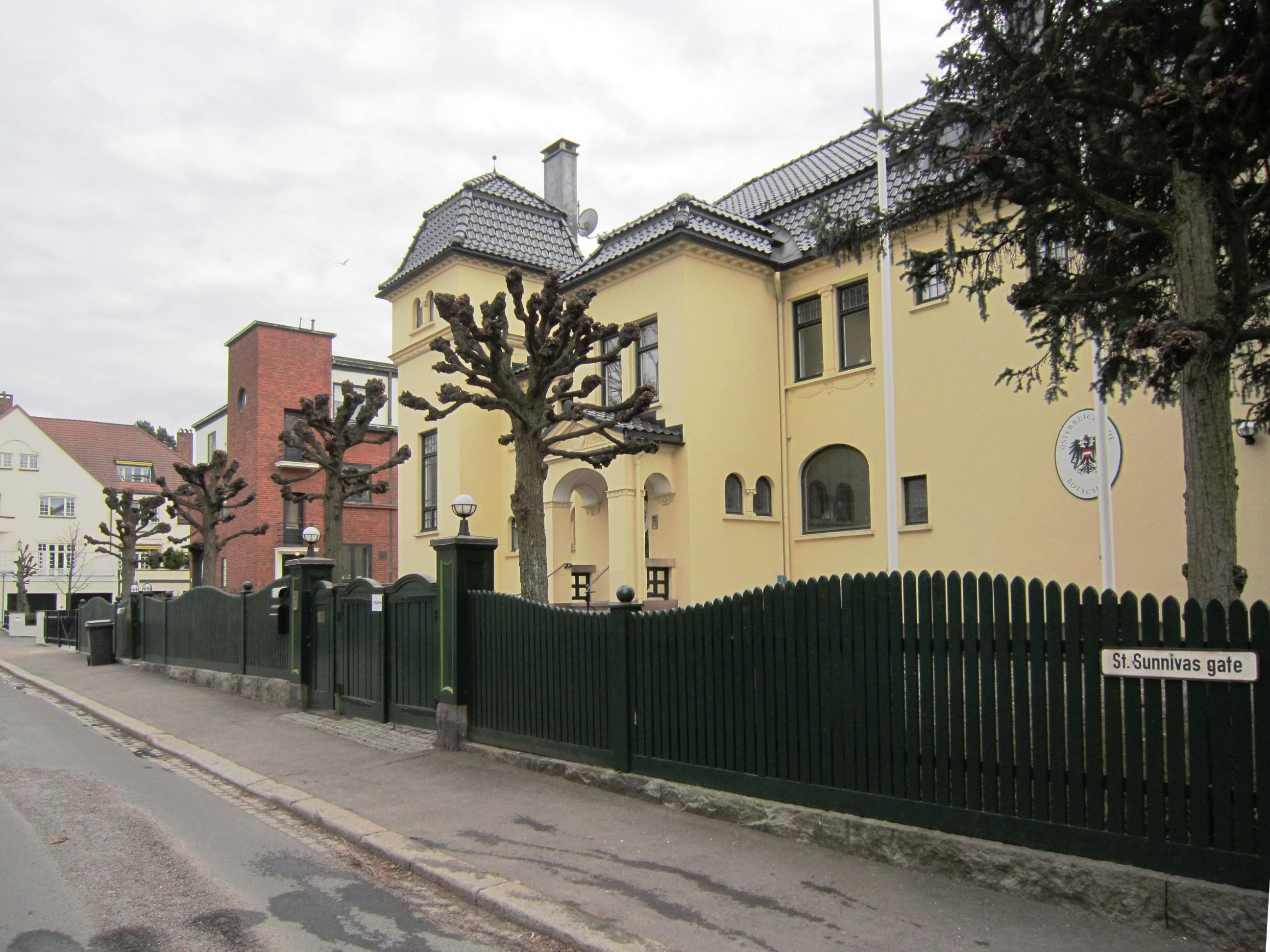 St. Sunnivas gate på Gimle i Oslo